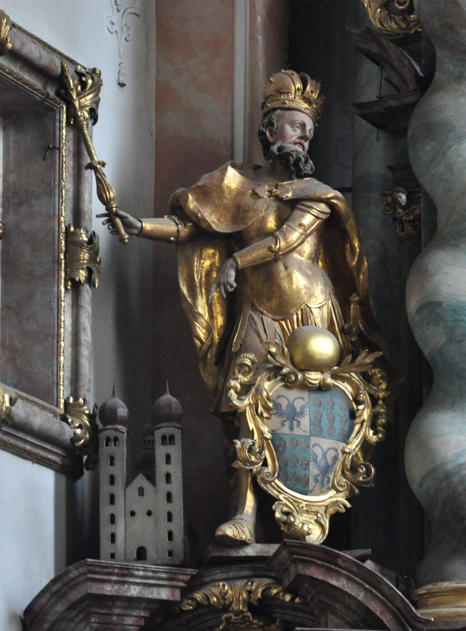 Klosterkirche Metten Hochaltar, Figur "Karl der Große" von Franz Mozart, 1714